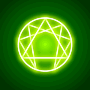 Eneagrama